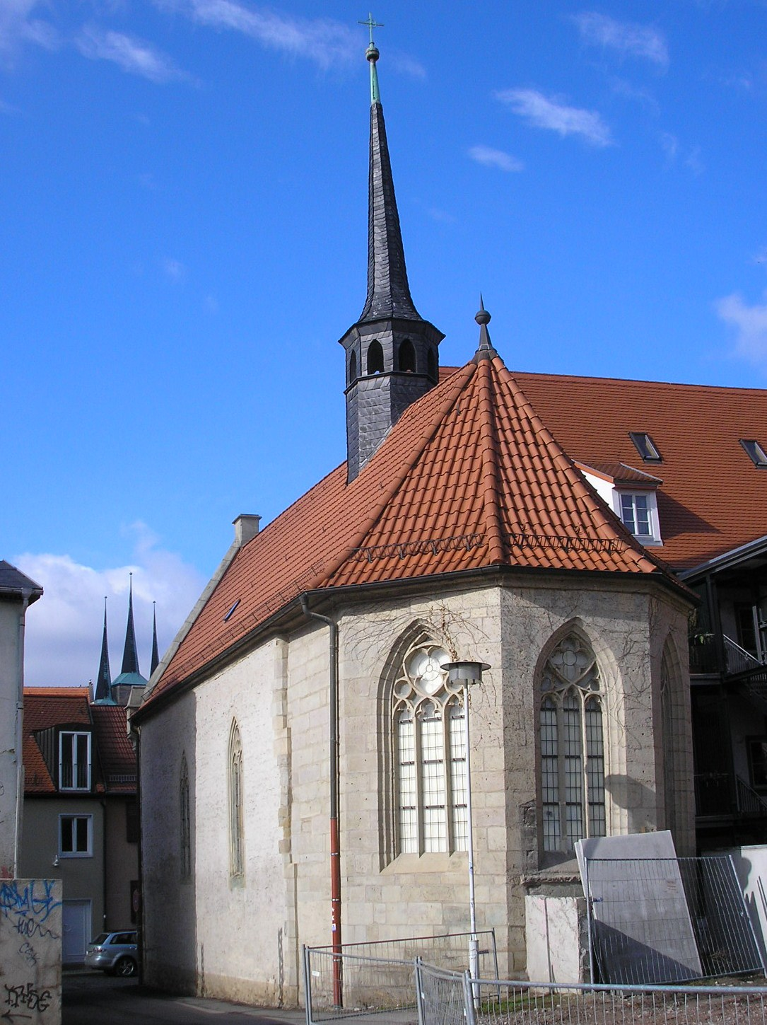 Die Magdalenenkapelle in der Altstadt von Erfurt (Thüringen).